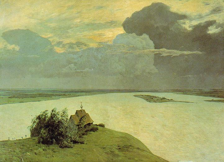 Above eternal peace